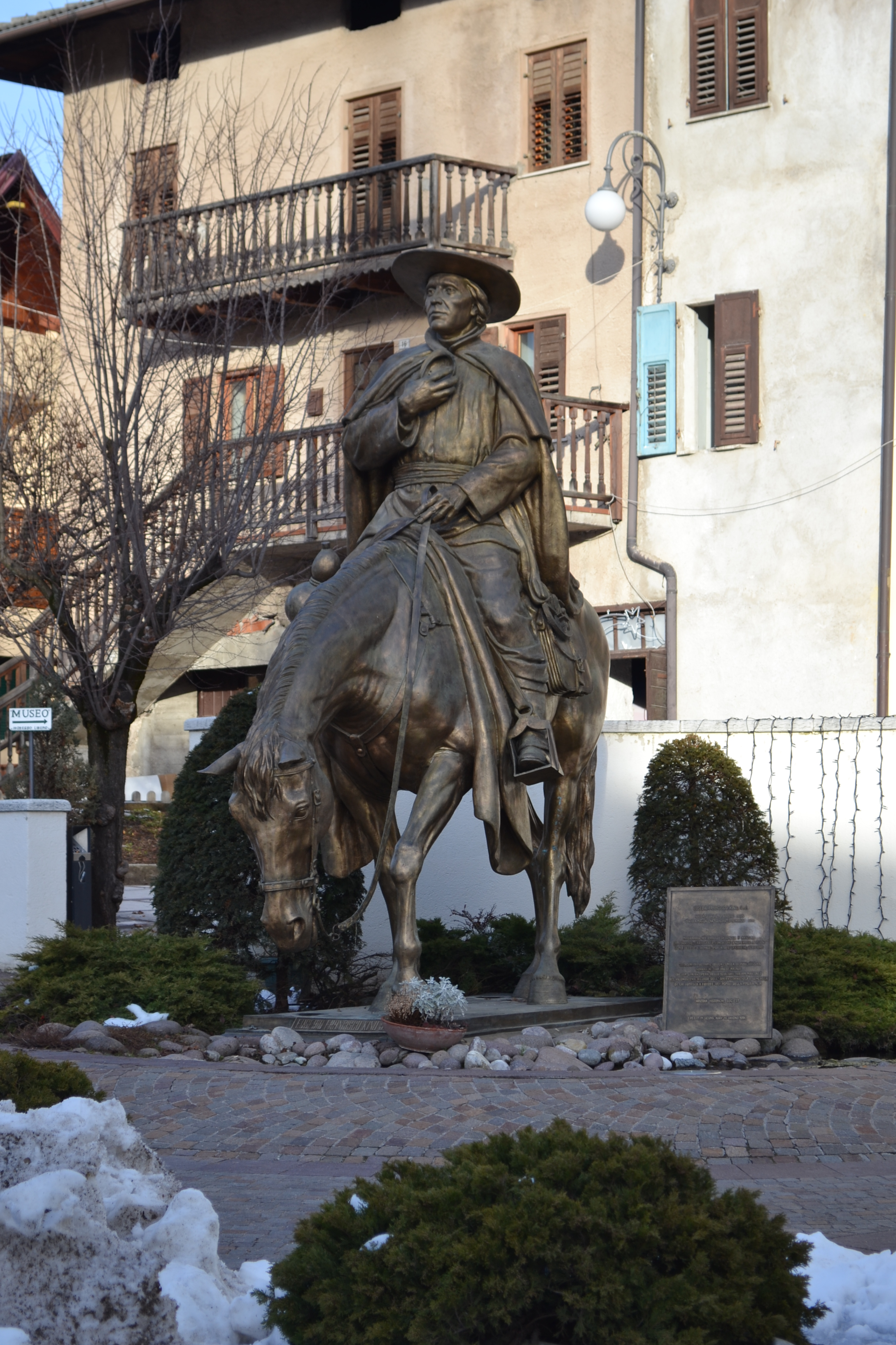 Statua raffigurante Padre Eusebio Francesco Chini a Segno (TN)